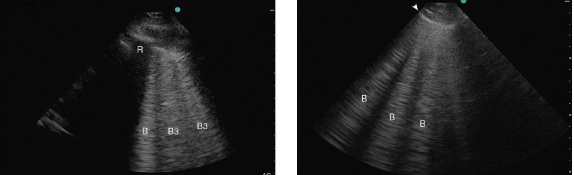 Ձախ կողմում - 3 մմ երկարության B գծեր (B3 lines) ալվեոլյար ինտերստիցիալ համախտանիծով պացիենտի մոտ։ Թոքամզային գծից 3 մմ և պակաս հեռավորության B գծերը հատկանշական են ՀՇ-ի վրա ալվեոլների այտուցի և ապակենման մգացումներին (ground glass opacity)։ Աջ կողմում - 7 մմ երկարության B գծեր (B7 lines) հատկանշական են ինտերստիցիալ այտուցին և միջբլթակային խտրոցների հաստացմանը։ ՍՇԴՀ-ին բնորոշ է B7 և B3 գծերի ոչ միատարր բաշխում, զուգակցված պնդացման և պահպանված օջախների հետ։